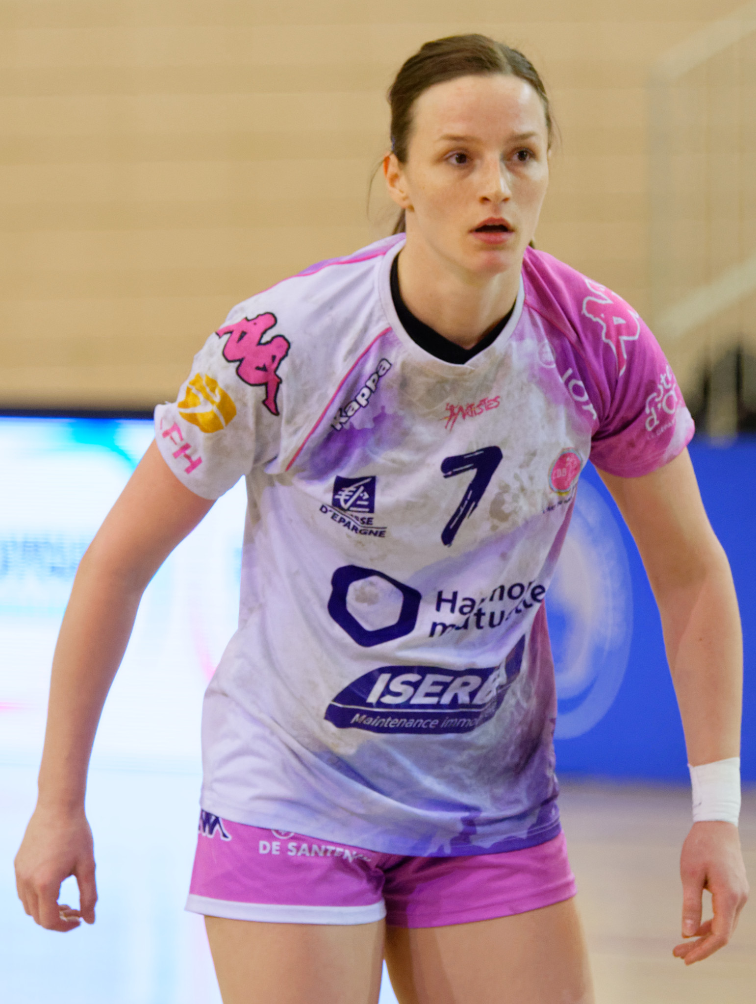 Rencontre entre Issy Paris Hand et Dijon. A Issy Les Moulineaux, le 25 février 2018.